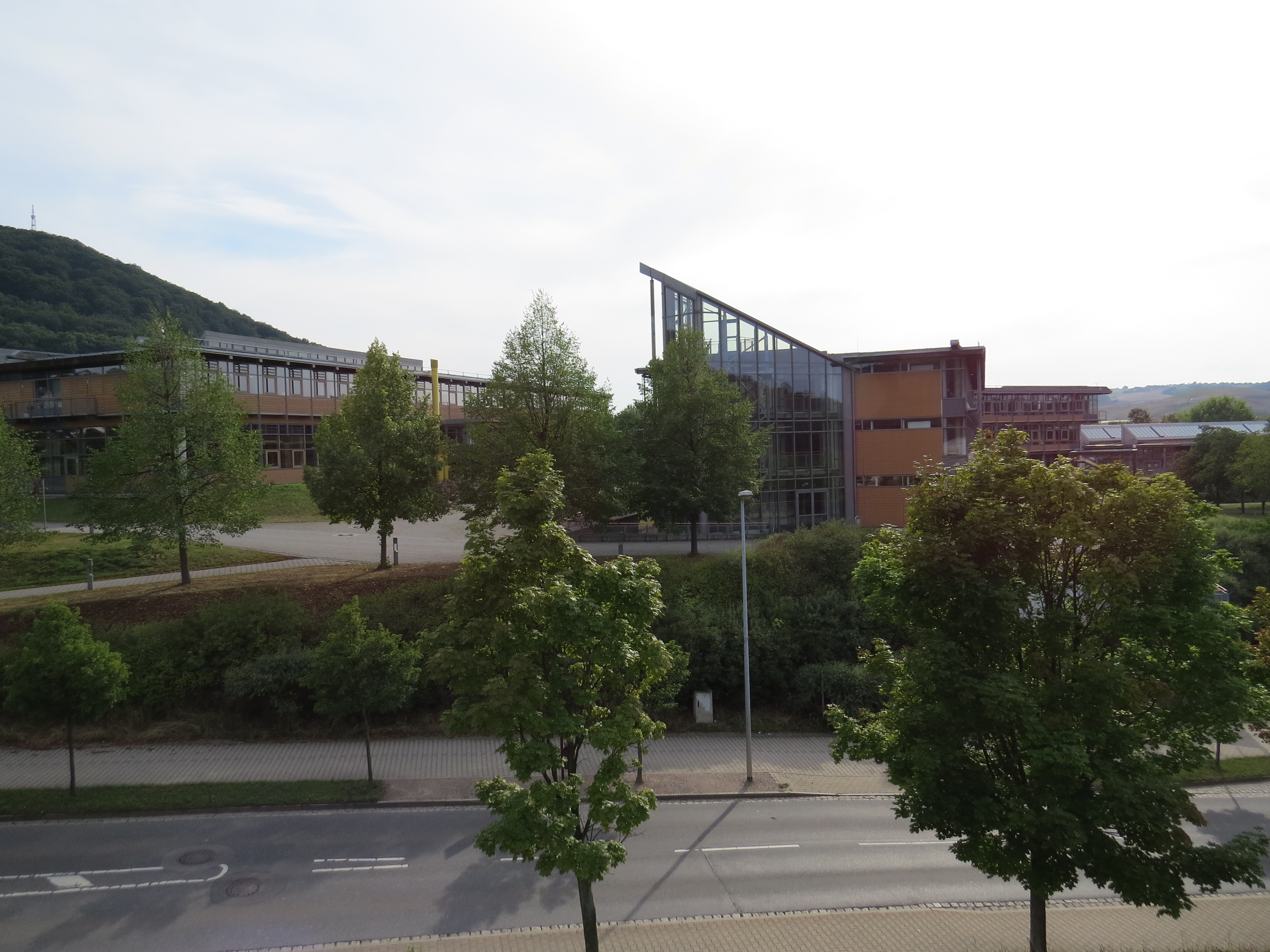 Das Berufsschulzentrum Burgk, im Vordergrund die Burgker Straße, Ansicht vom Dach des Real-Supermarktes aus.